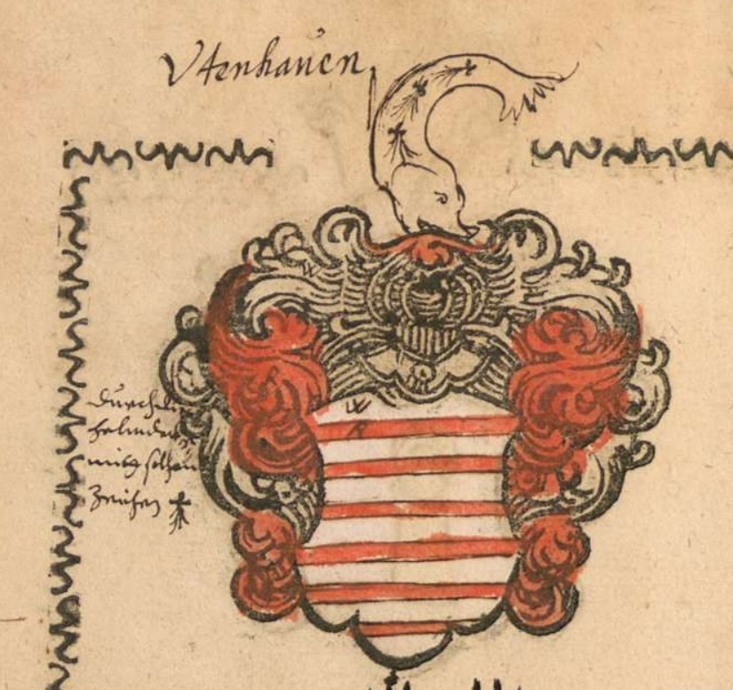 Wappen der Familie Utenhoven (Utenhauen)